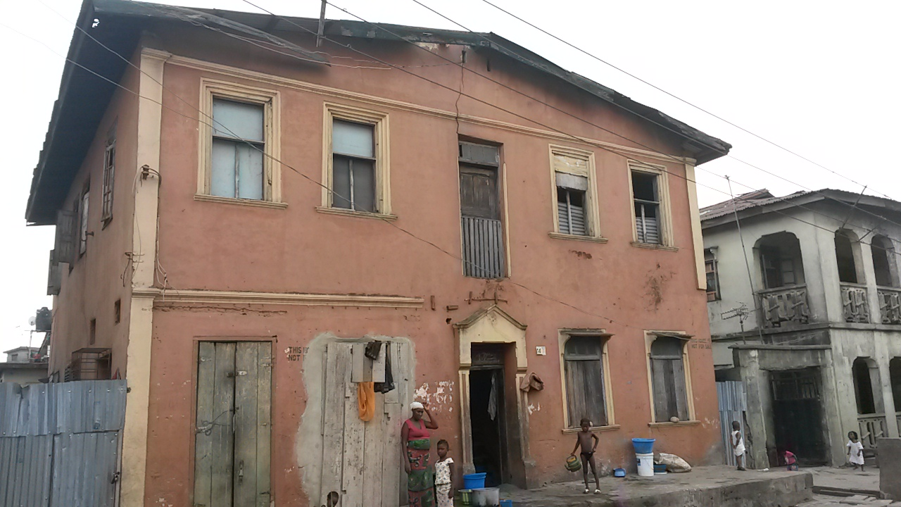 Ebute Metta, Lagos, Nigeria